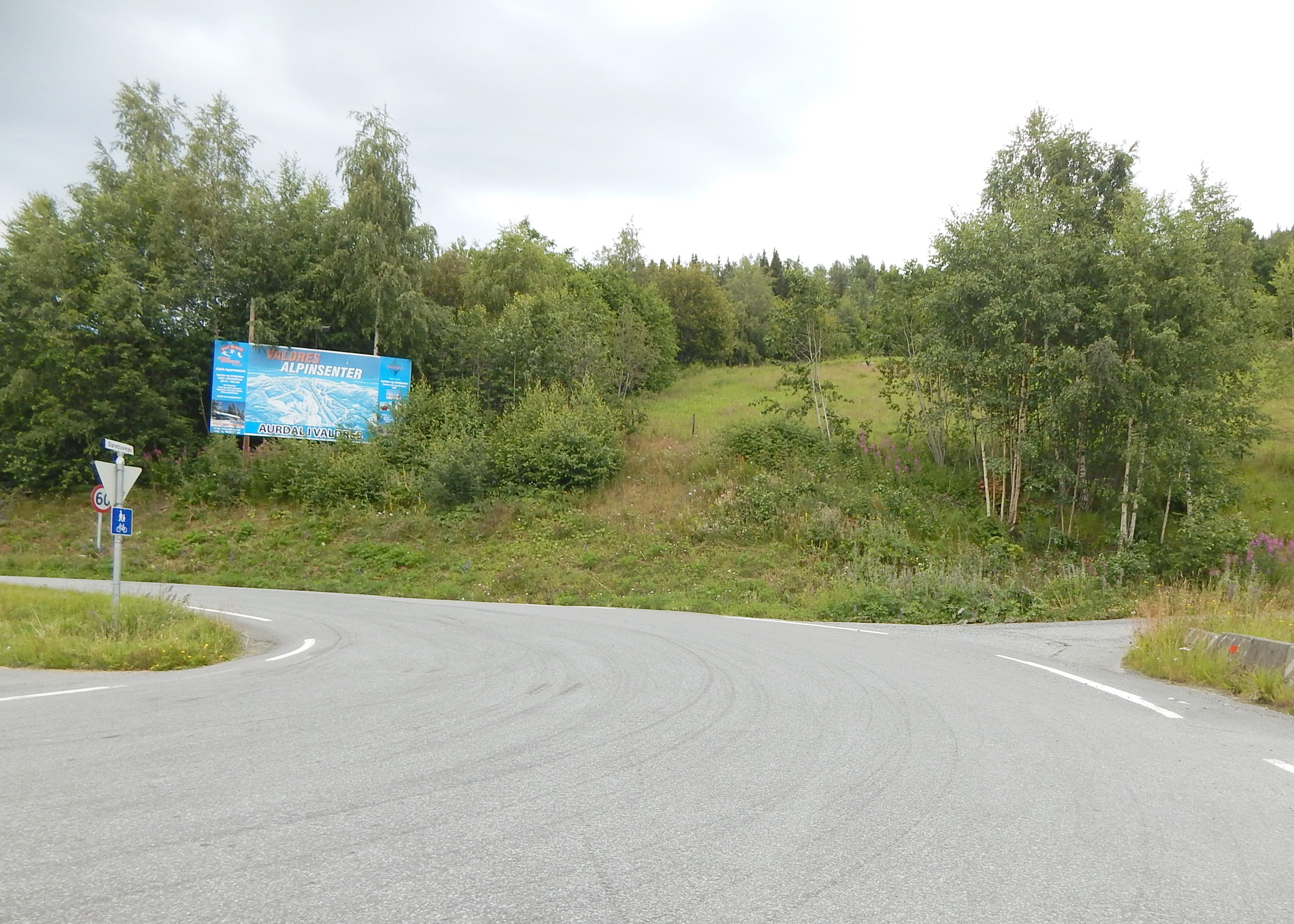 Danebuvegen går opp fra E16.